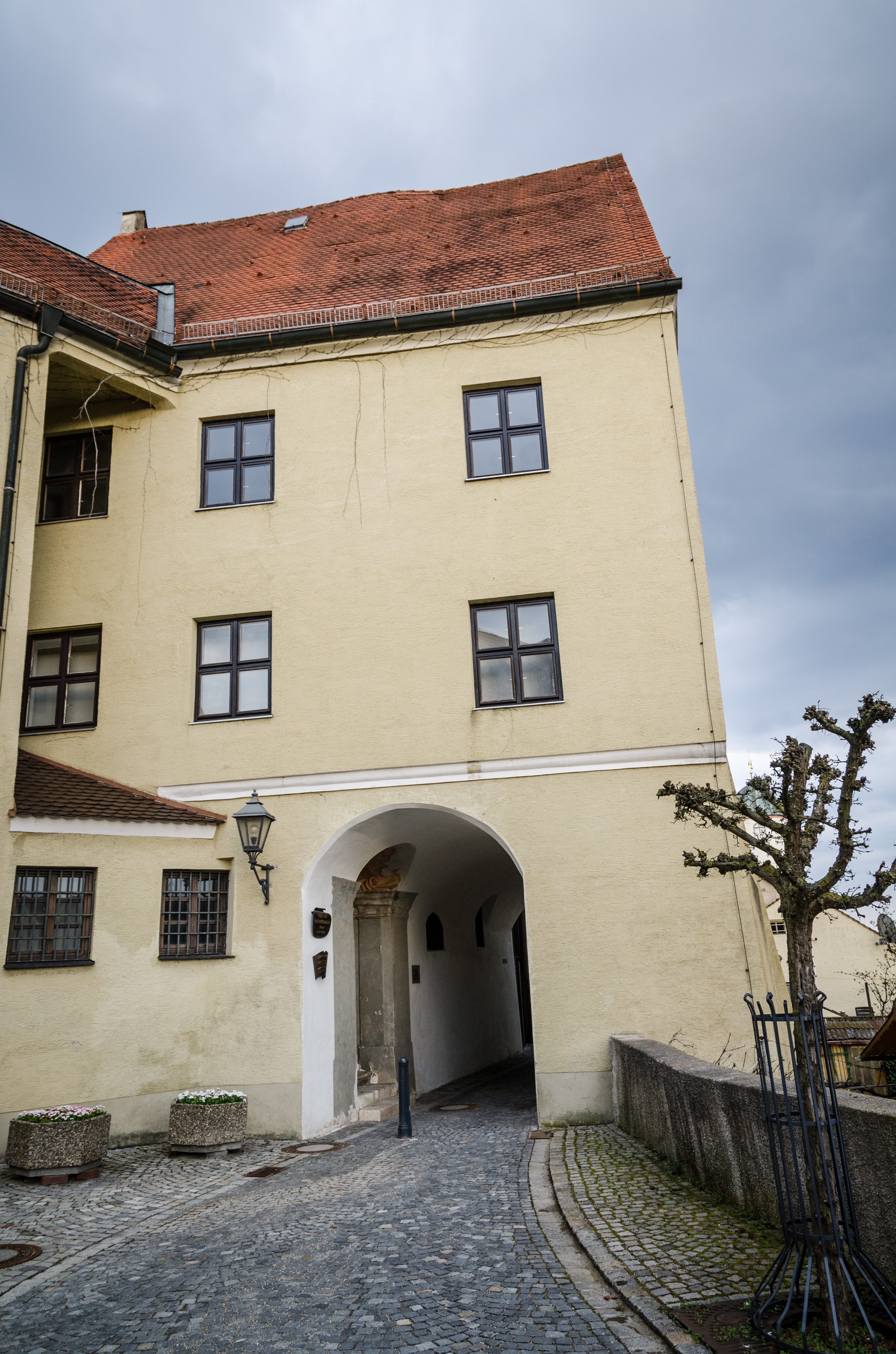 Dillingen, Hafenmarkt 11